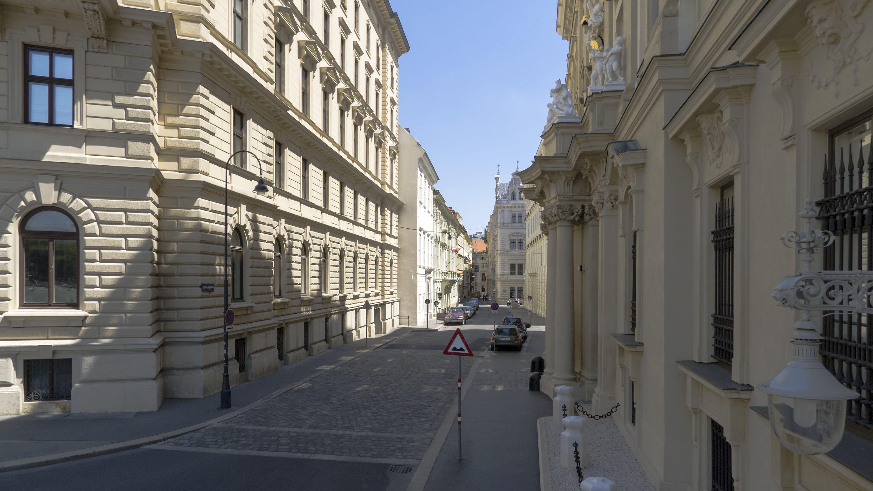 Bankgasse in Wien 1 bei der Löwelstraße Richtung Osten